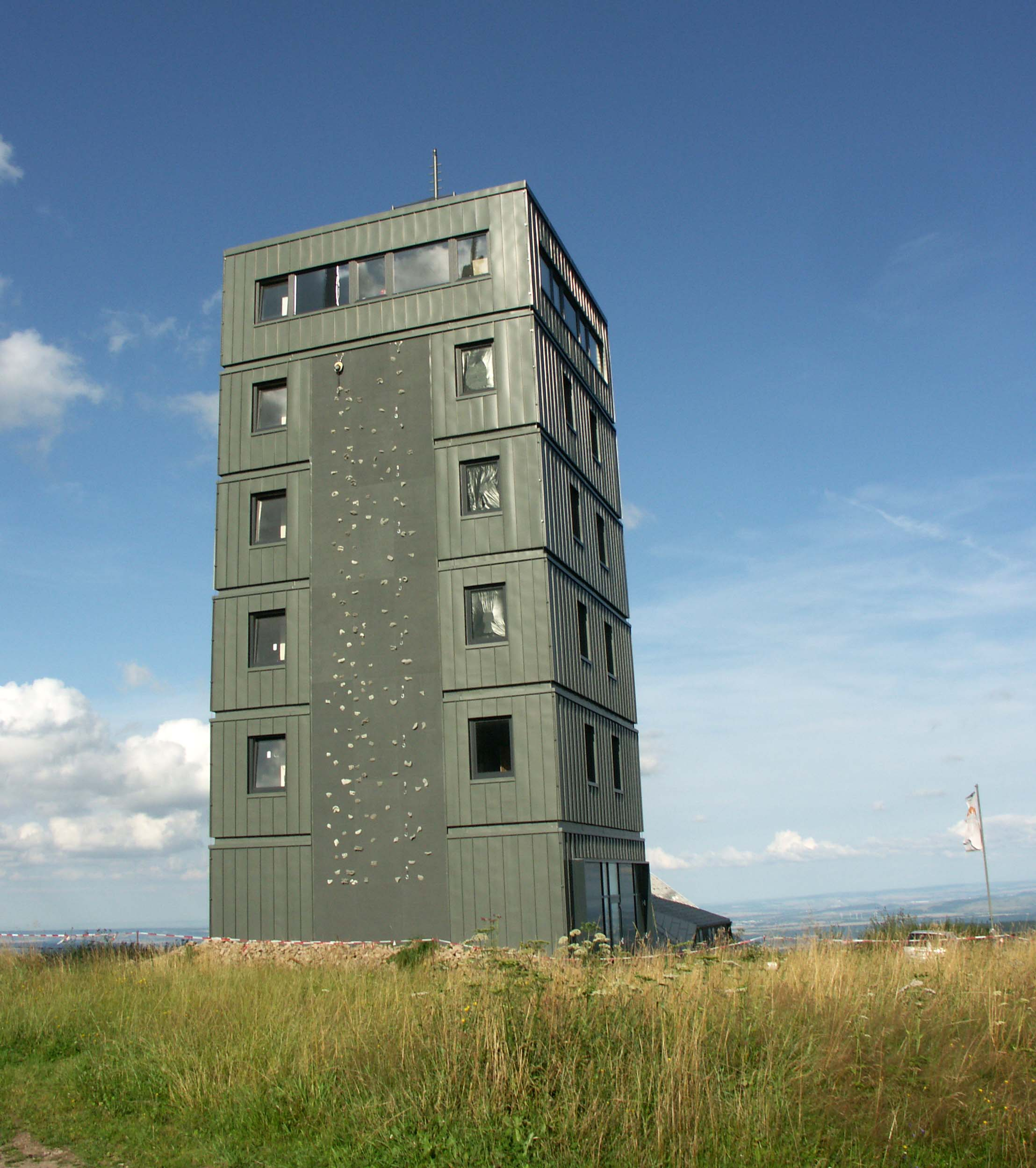 23m hoher Aussichtsturm auf dem Großen Inselsberg mit 2 Kletterwänden (entstanden aus dem alten Richtfunkturm)